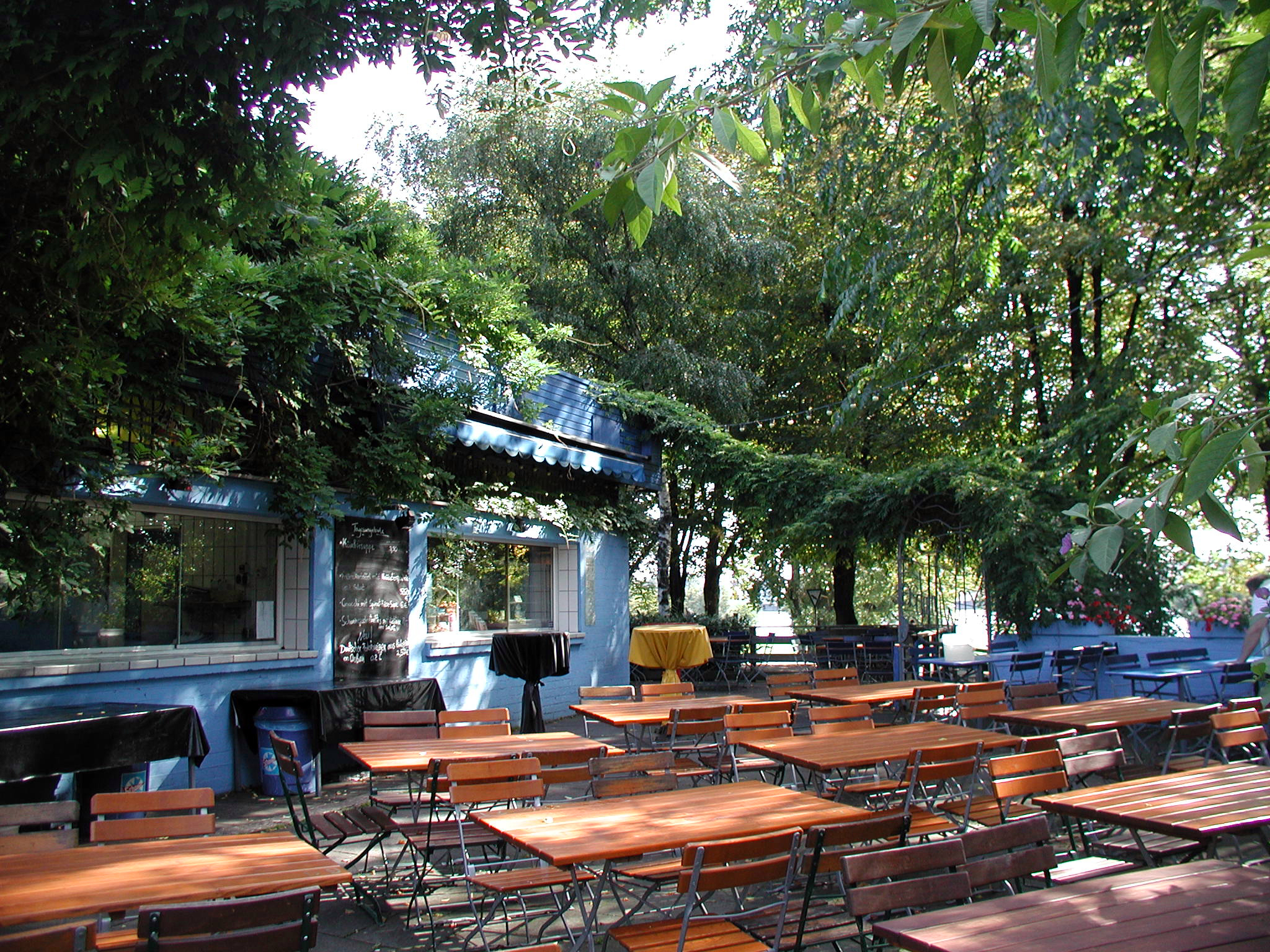 Köln, ehemaliges Riehler Freibad Riehler Aue